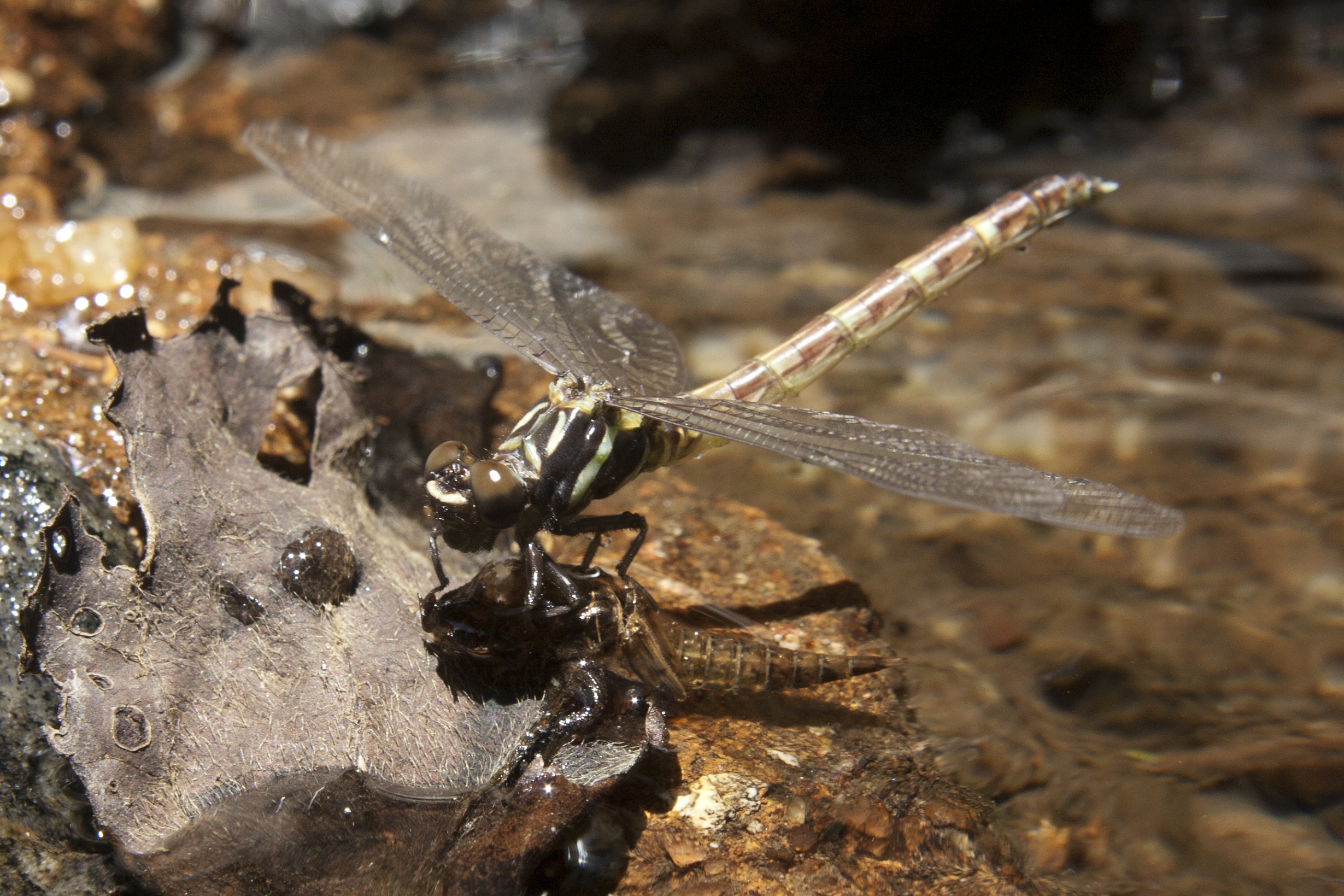 Fotografia de uma libélula adulta emergindo de seu estágio de ninfa. Parque Nacional da Tijuca, Rio de Janeiro, Brasil.